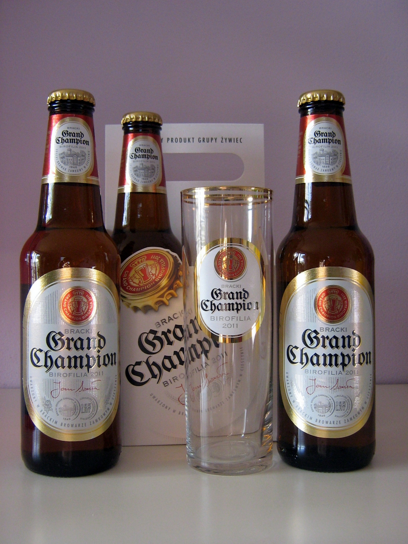 Zwycięzca Festiwalu Grand Champion Birofilia 2011